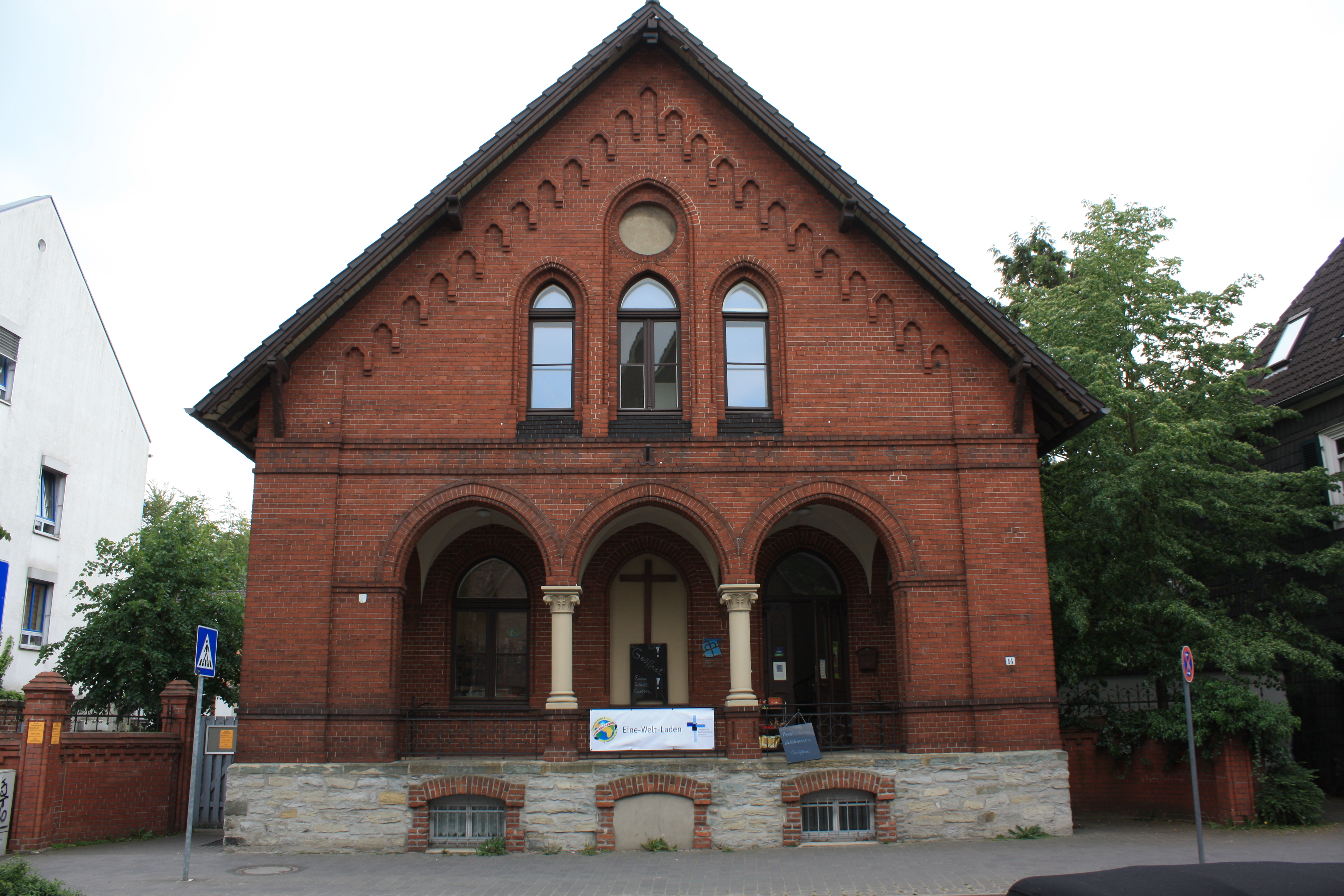 Ehemaliger Konfirmandensaal an der Kirchstraße 14 in Gütersloh This is a photograph of an architectural monument. 184